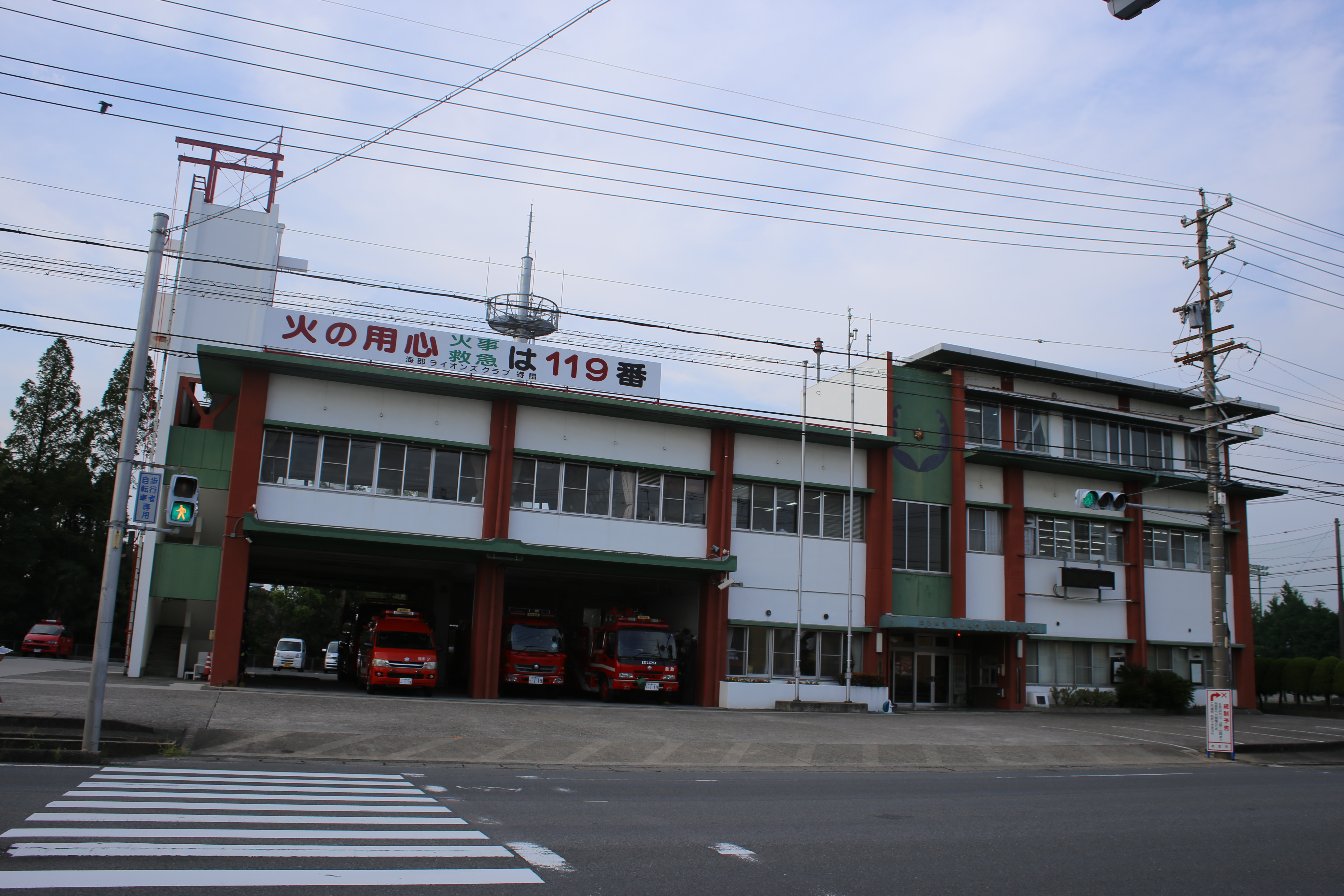 愛知県あま市七宝町遠島十坪の海部東部消防組合本部を南側公道西側より撮影